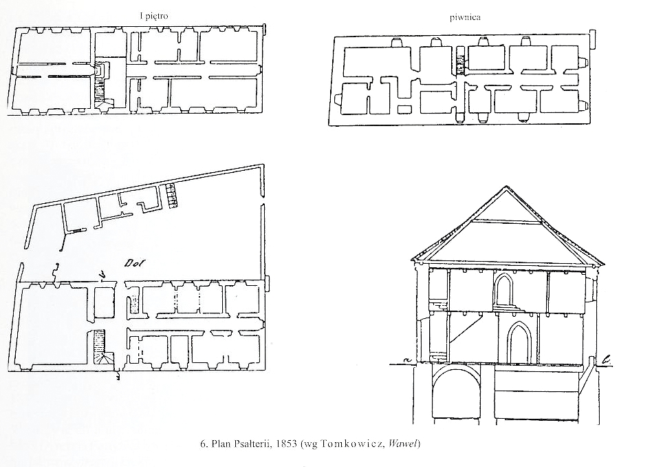 Sporządzony w 1853 roku rysunek elewacji, przekroju i planu budynku Psałterii stojącego do połowy XIX wieku na dziedzińcu zewnętrznym zamku na Wawelu.